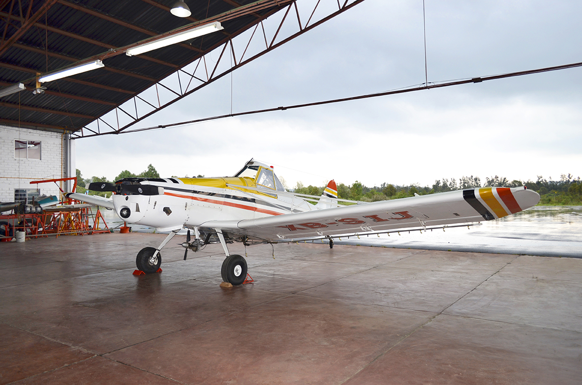 AVIÓN BARCENAS 01